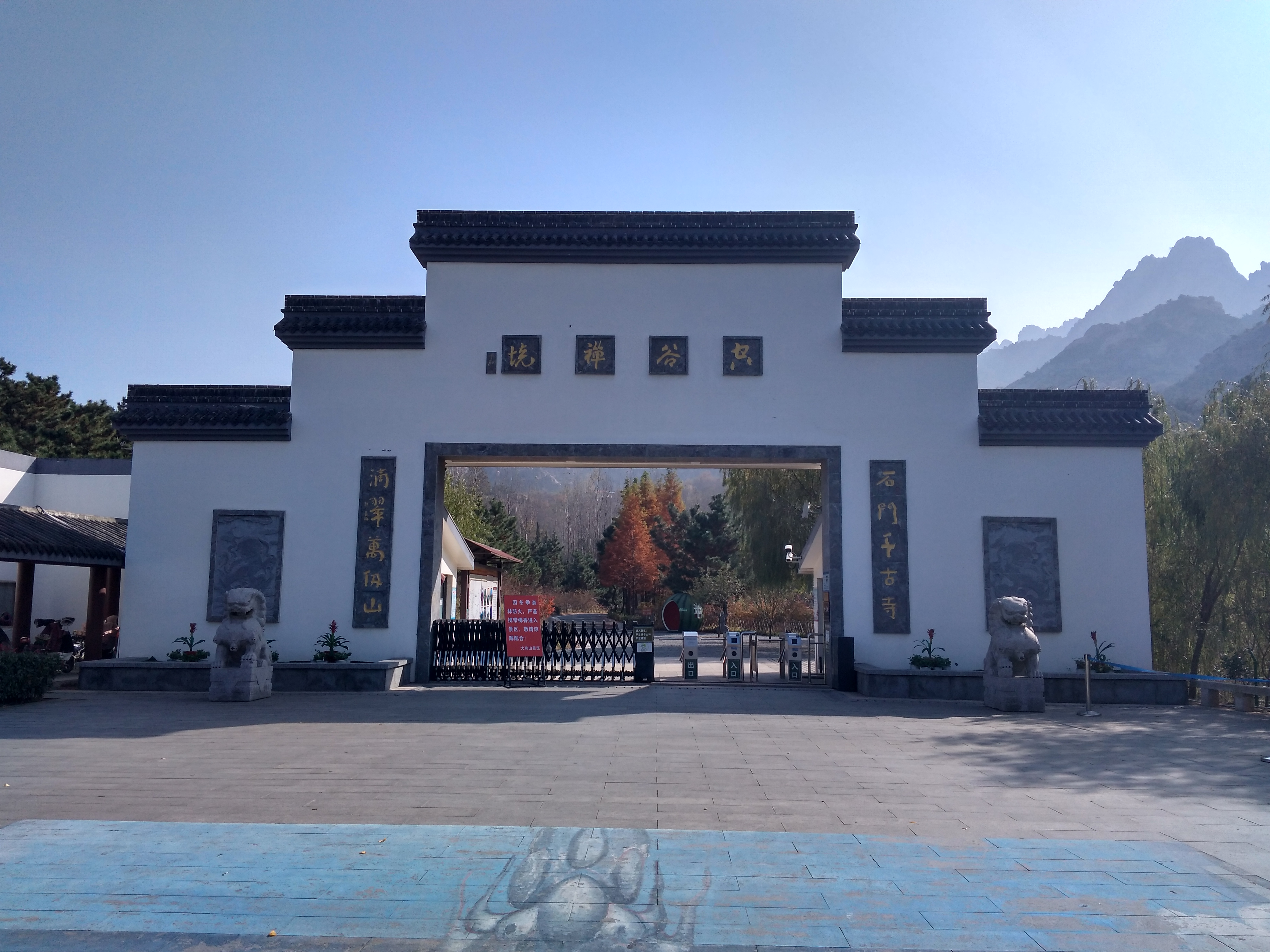 青岛大珠山风景区北门